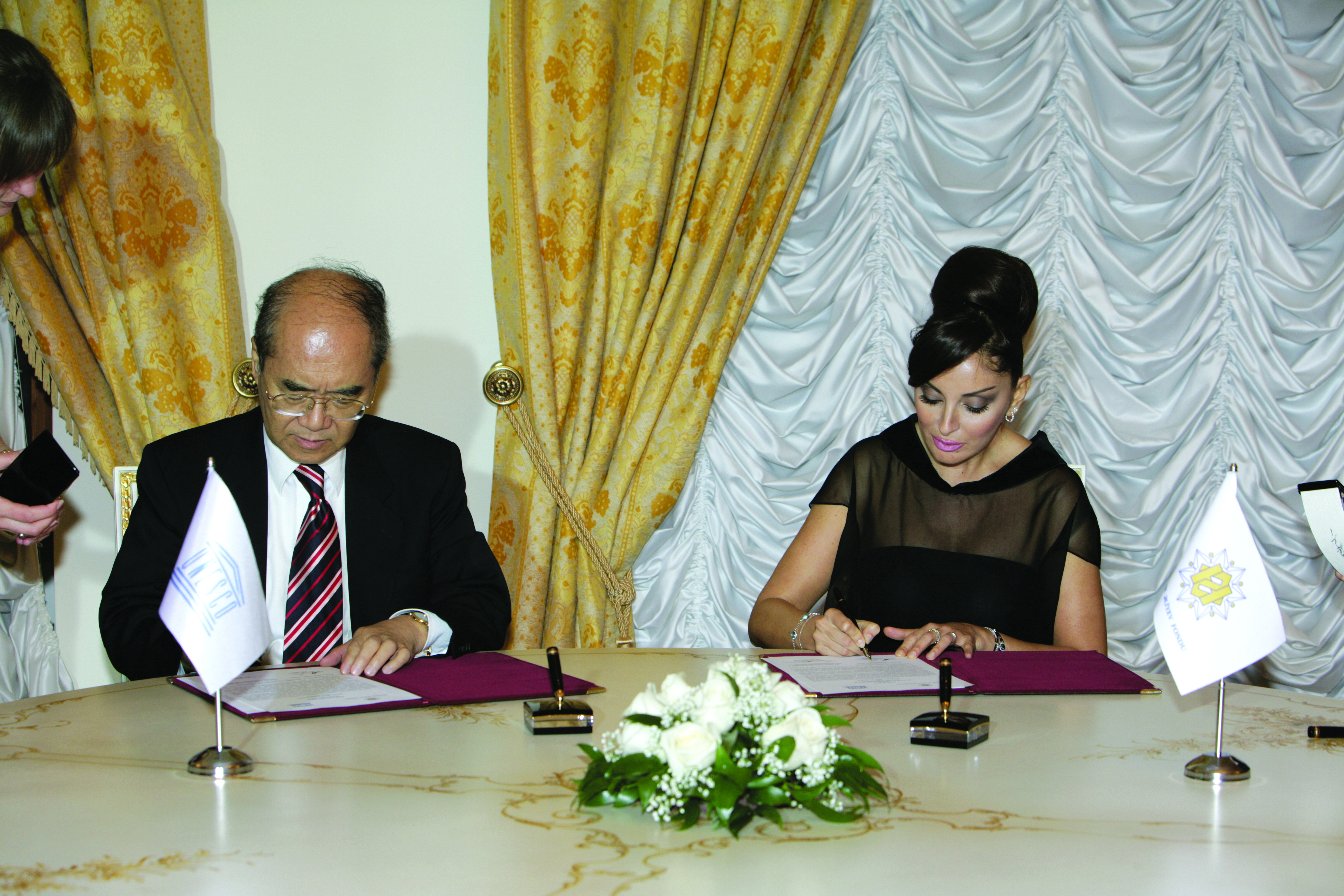 Heydər Əliyev Fondu və UNESCO arasında qeyri-maddi mədəni irsin qorunması üzrə strateji hədəflərə nail olmaq məqsədi ilə Əməkdaşlıq sazişinin imzalanması. 19 mart 2009-cu il.